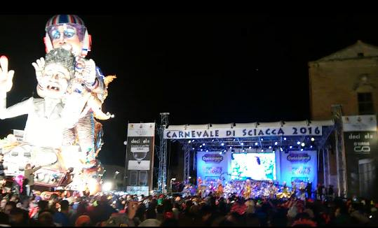 carnevale sciacca palco